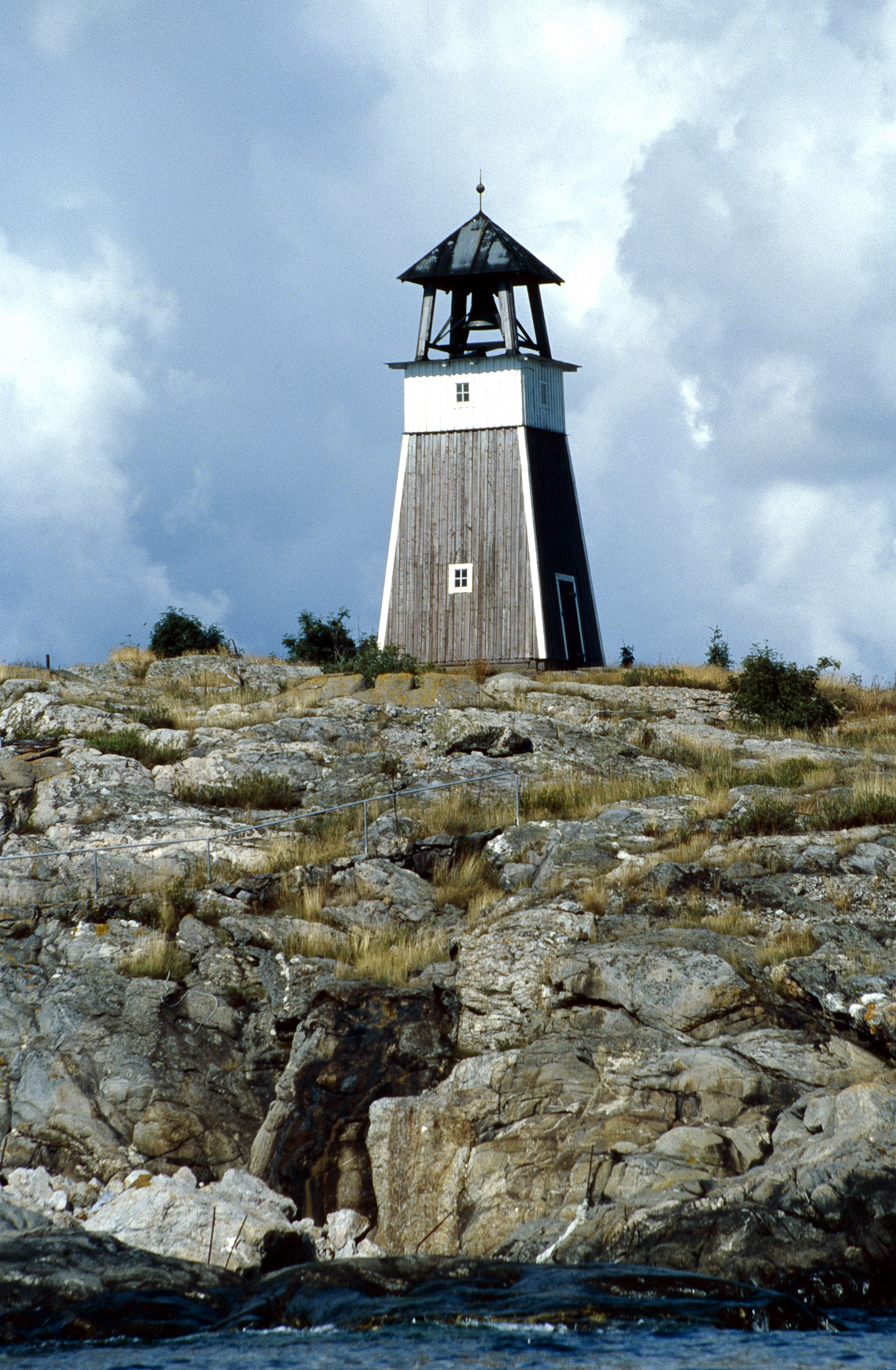 Klockstapeln på Måsknuf sommaren 2005